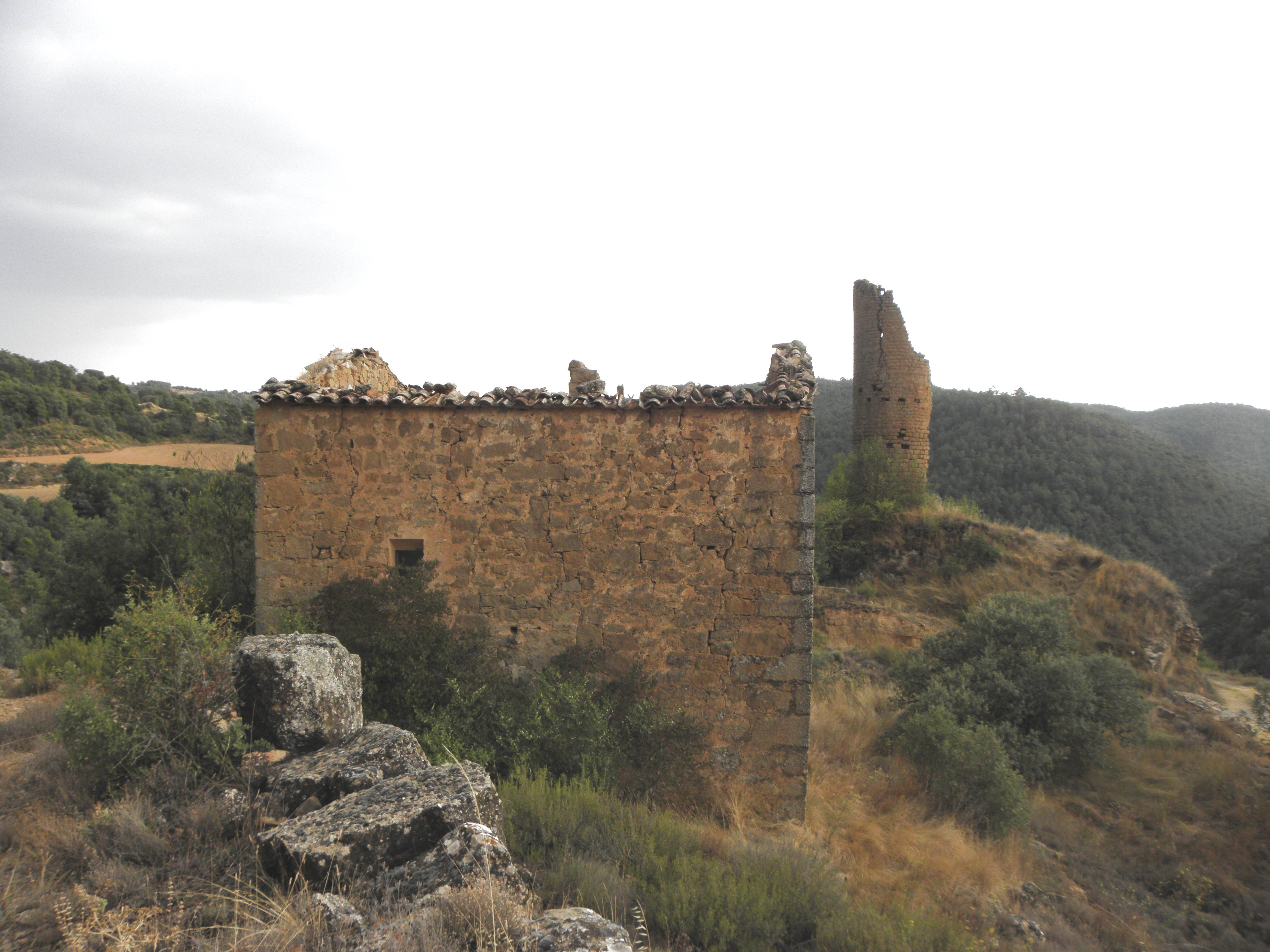 La façana nord de la masia de Can Capità al poble de Sallent (Pinell de Solsonès) amb la torre de guaita de Sallent.